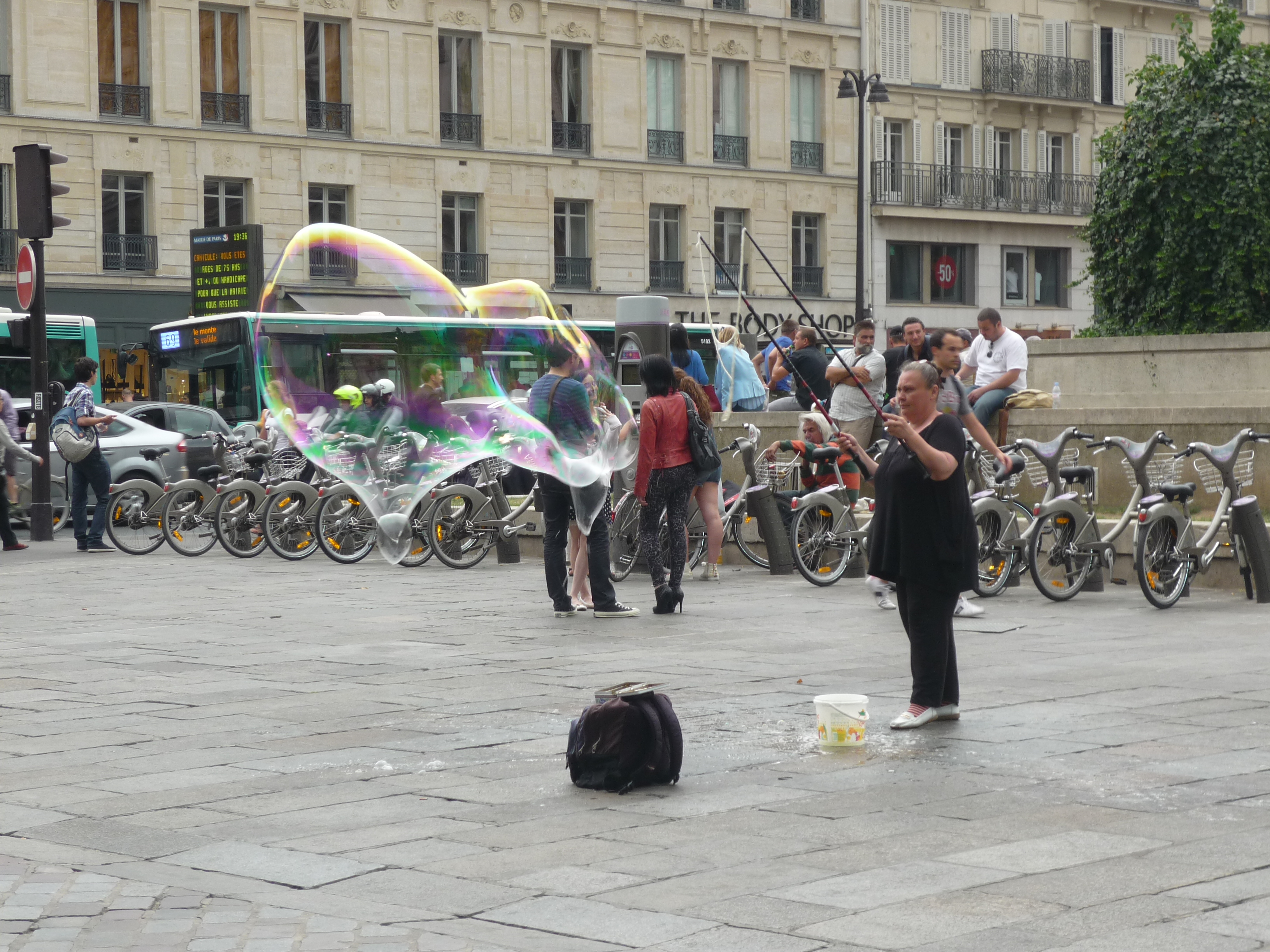 Bulle de savon géante place de l'Hôtel de Ville à Paris.